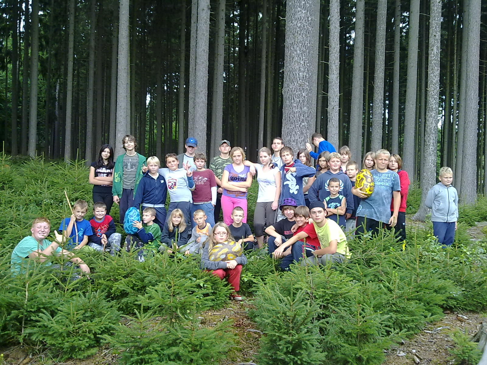 Tábor Bohdalov 2010